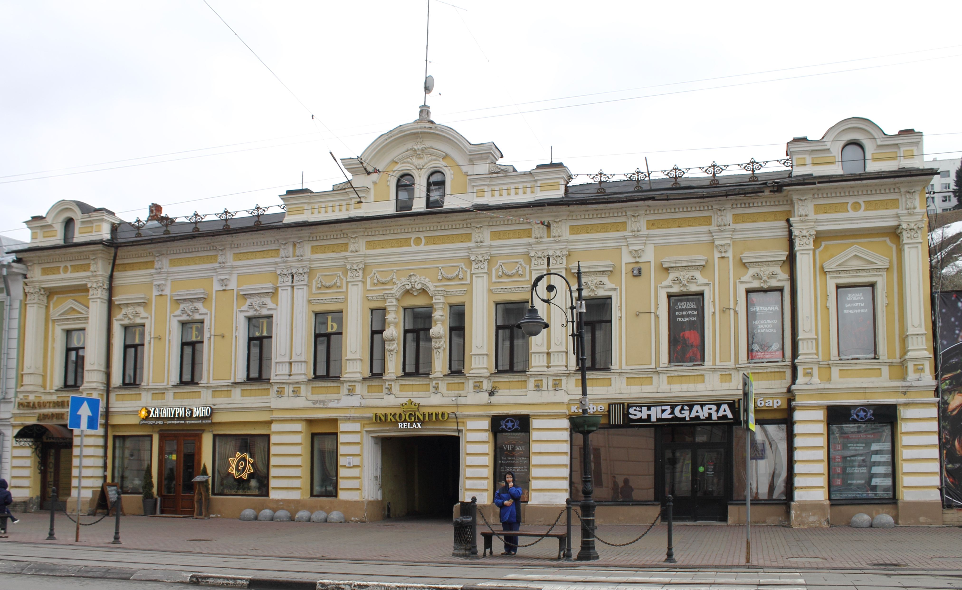 Доходный дом: улица Рождественская, 20, Нижний Новгород, Нижегородская область